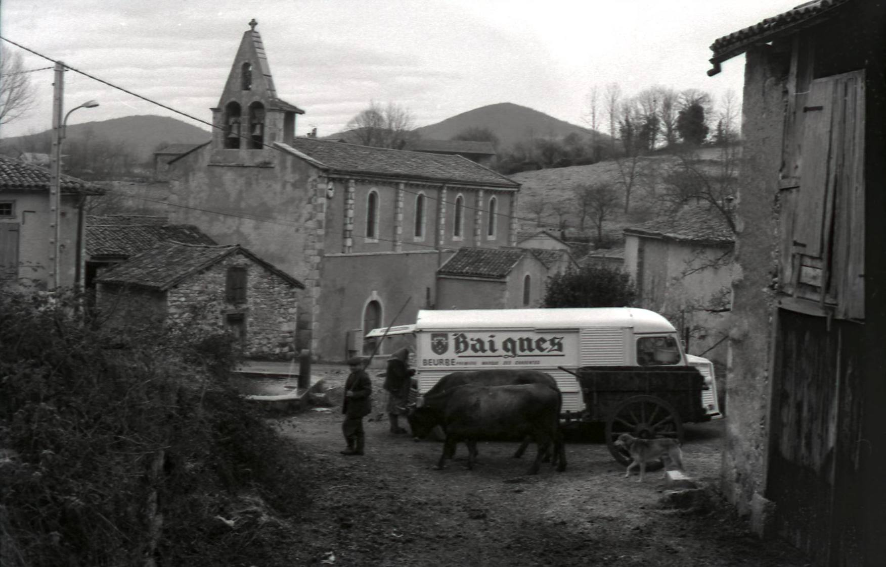 Village d'Arguenos (Haute-Garonne). 10 janvier 1978. Vue d'ensemble au coeur du village ; au 1er plan un homme de profil regarde le photographe, il est suivi par un atelage tiré par deux boeufs ; au 2nd plan camionette d'un marchand ambulant (Baignes), une dame est en train d'acheter quelque chose (vue de profil) ; en arrière-plan église.